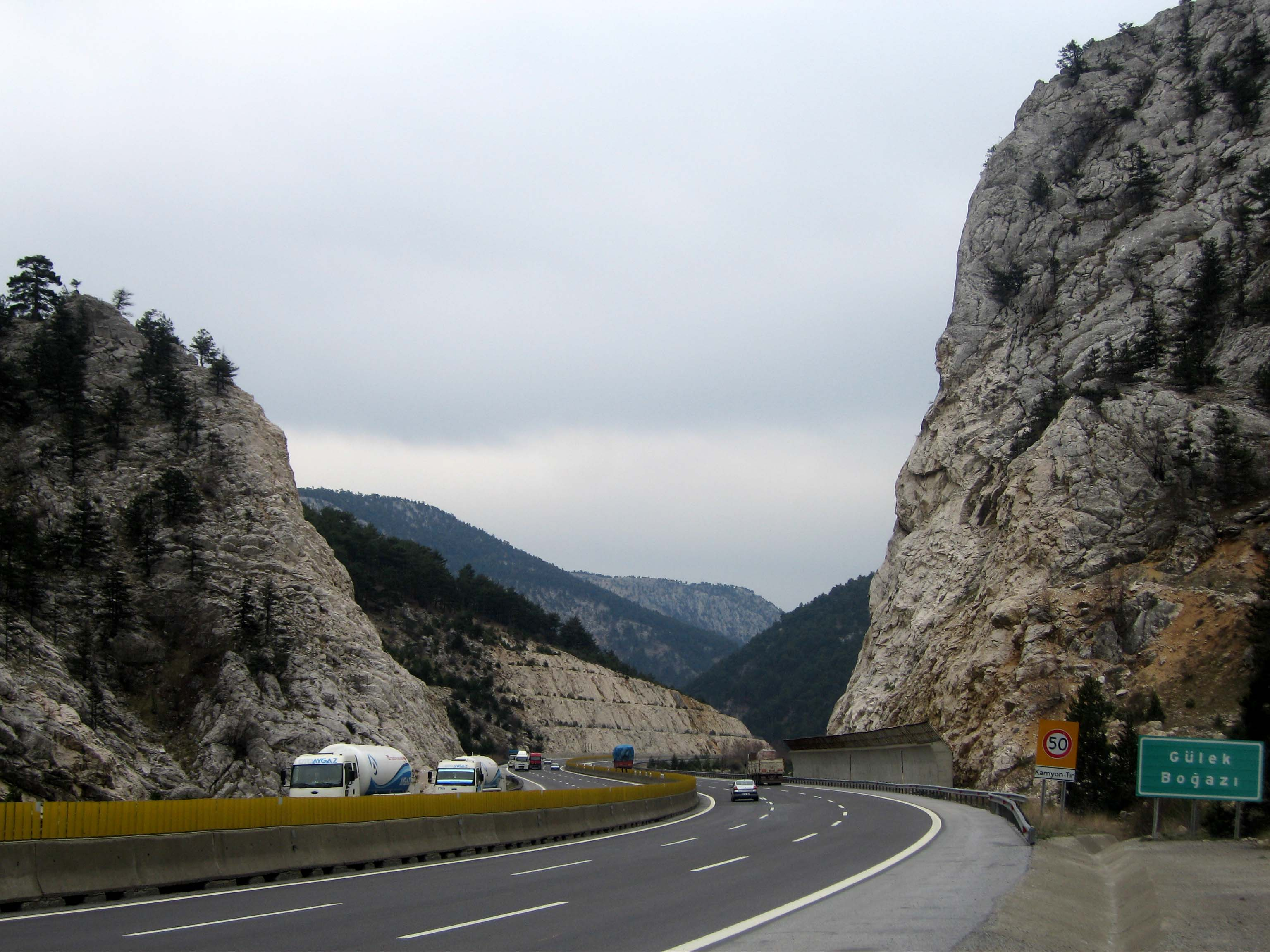 Fotografía tomada en abril de 2007 durante un viaje de la Sociedad catalana de Geografía por el autor de las puertas de Hierro o Puertas Cilícias, aunque en el letrero colocado por los constructores de la autopista hace referencia a una sonrisa, la formada por el desfiladero para recibir a los visitantes.